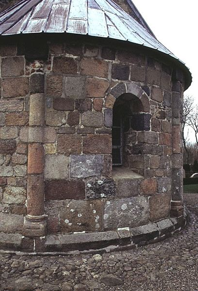 Lihme Kirke, (Skive Kommune), Apsis